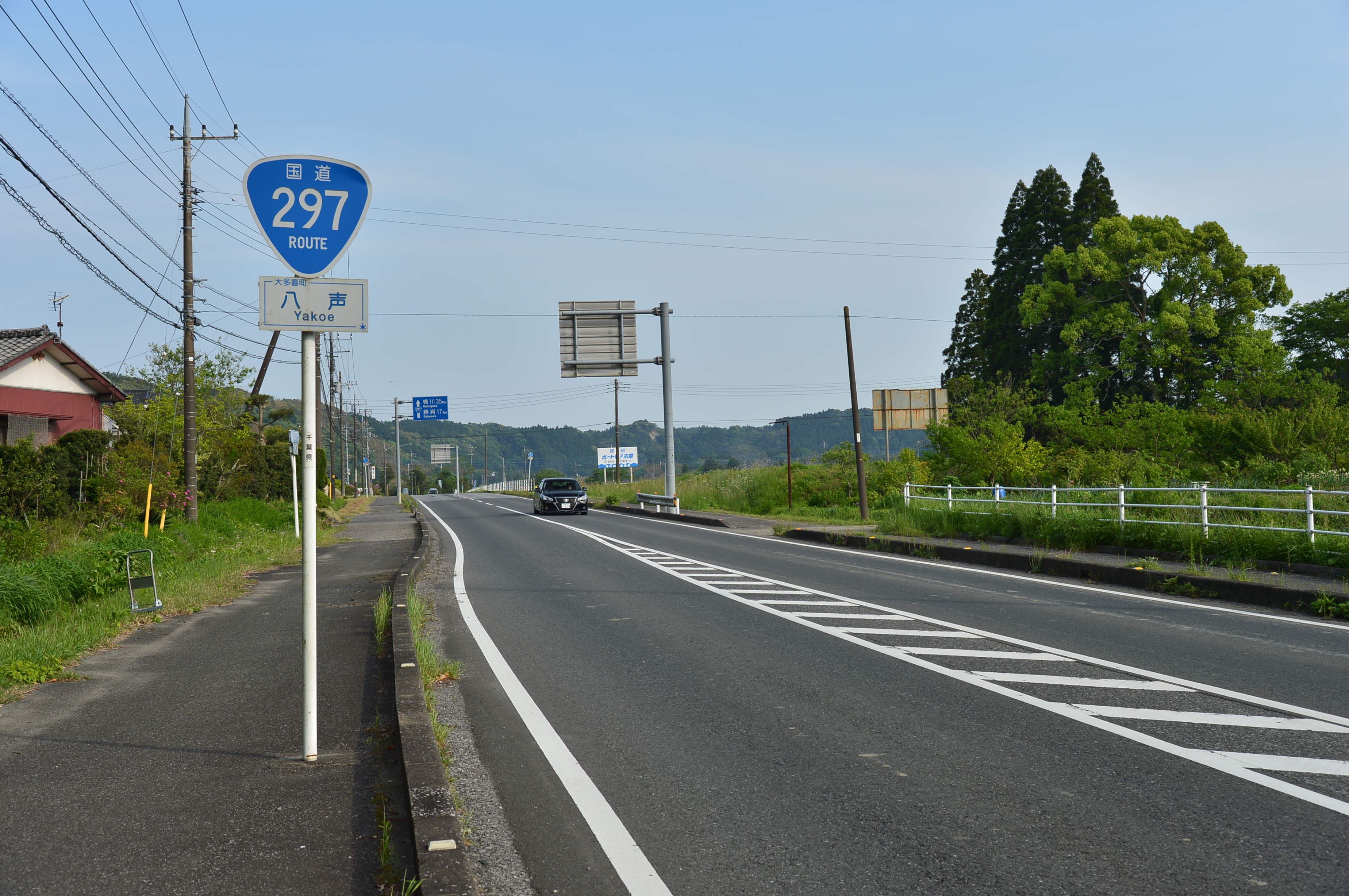 国道297号（千葉県大多喜町八声）。国道465号交点（八声交差点）付近にて、勝浦方面に向け撮影。